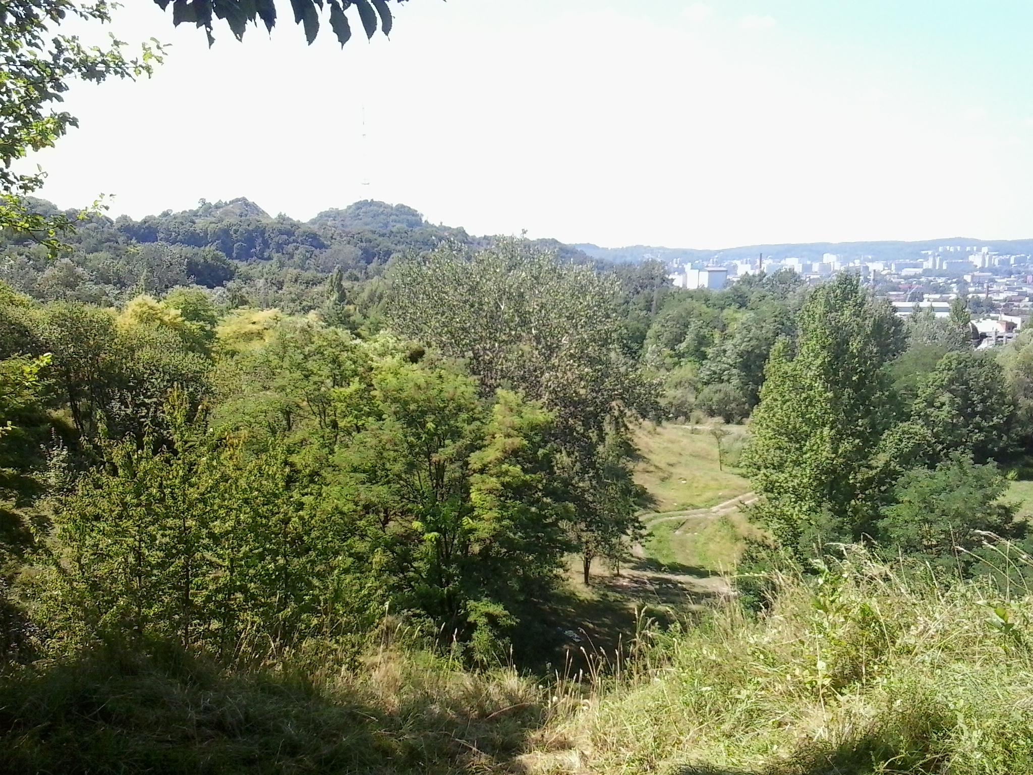 Park Znesinnya